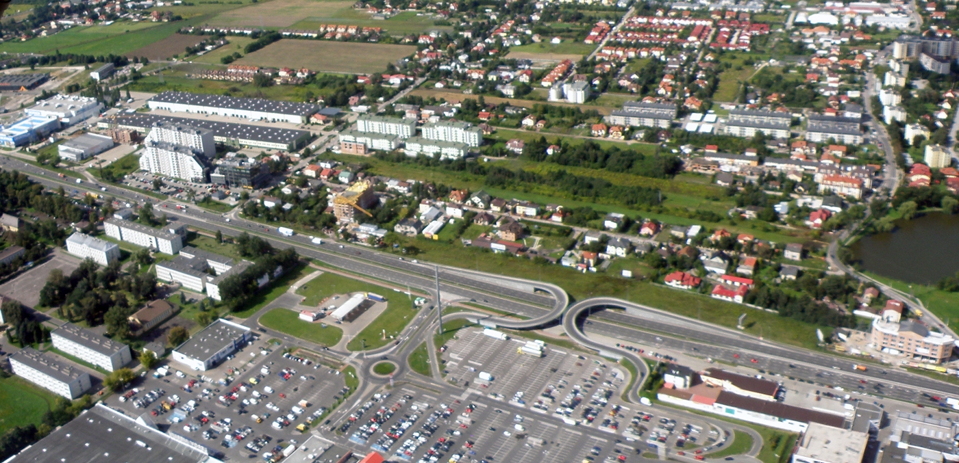 Piaseczno, województwo mazowieckie